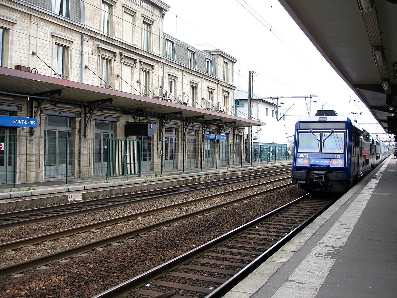 Gare de Saint-Denis (Seine-Saint-Denis), France.